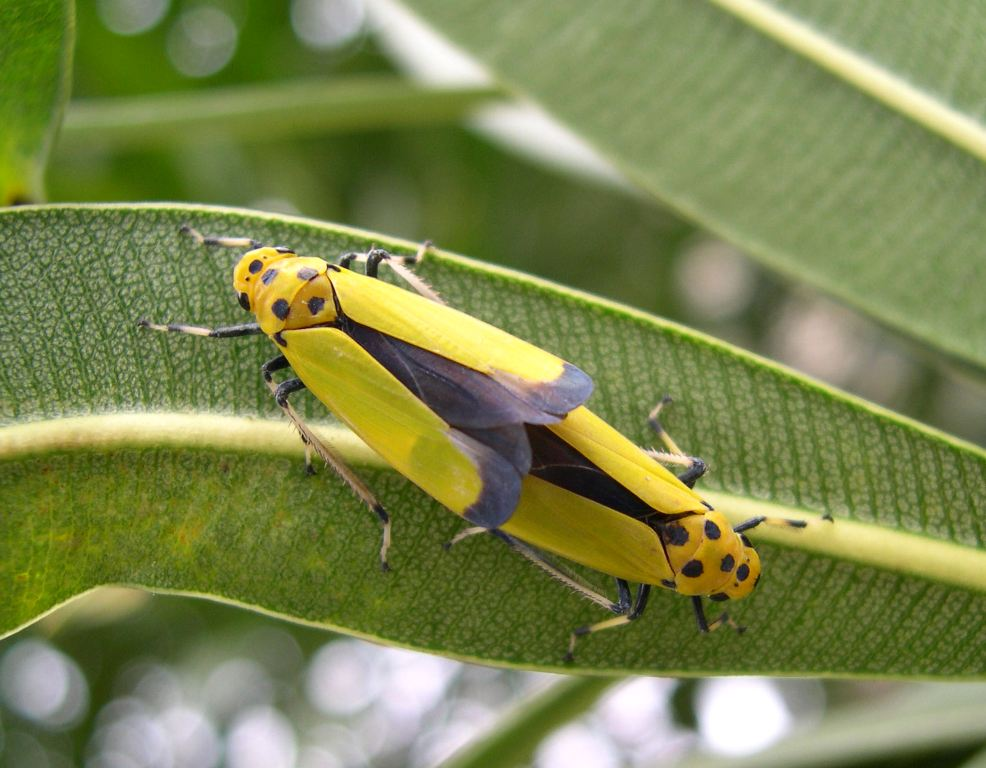 Bothrogonia ferruginea (Fabricius, 1787) (Auchenorrhyncha: Cicadellidae: Cicadellinae: Cicadellini). Loc: Yokohama, kanagawa, japan. ja: ツマグロオオヨコバイ（ヨコバイ科：オオヨコバイ亜科：オオヨコバイ族） 横浜市。